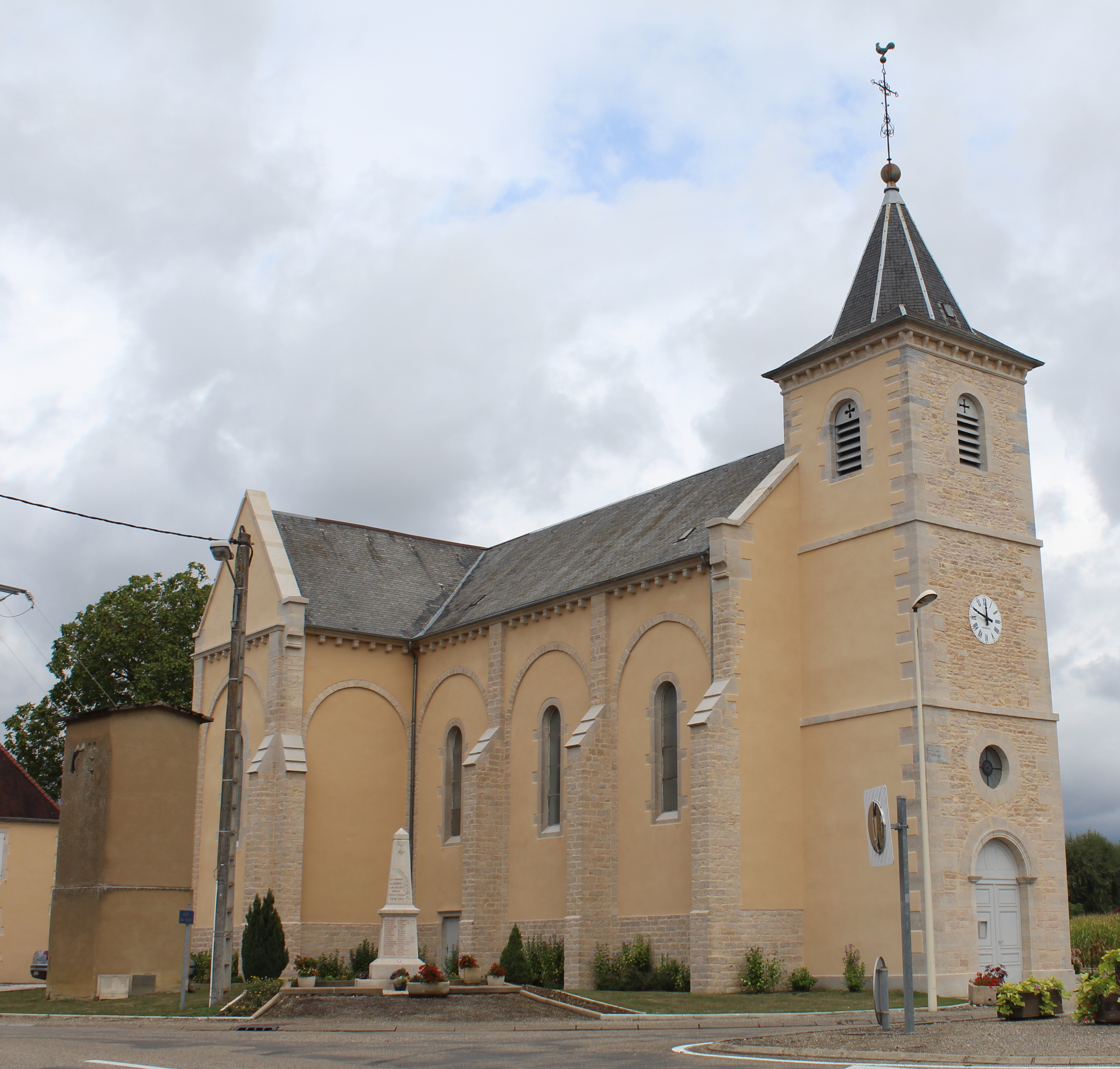 Église Saint-Louis des Essards-Taignevaux.